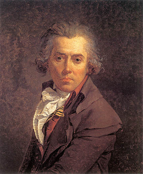 Self-portrait